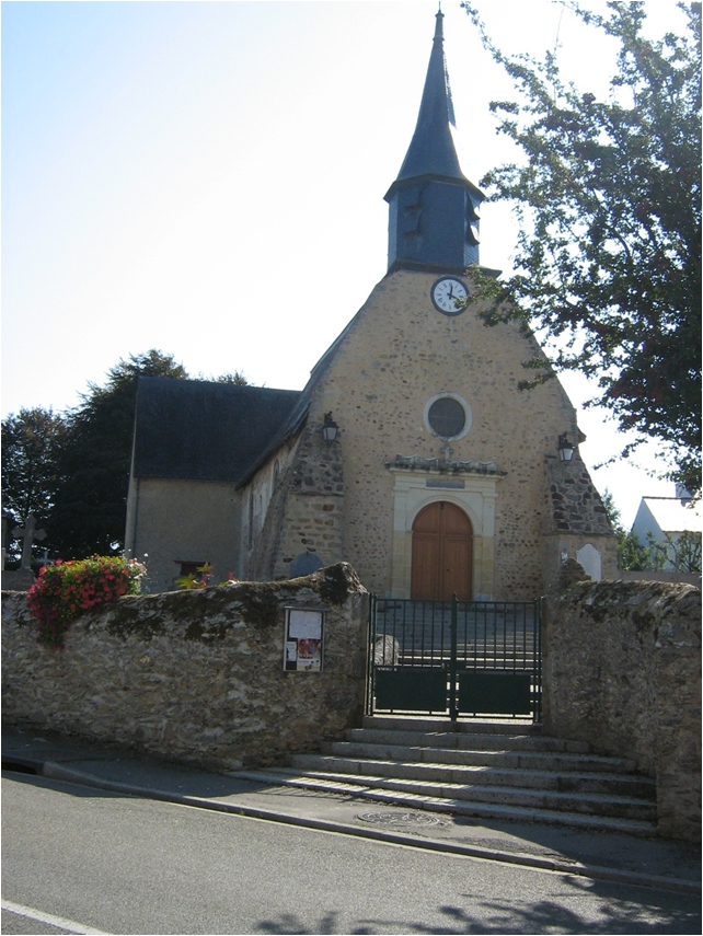 Forcé (Mayenne) - Eglise Ste Marie-Madeleine